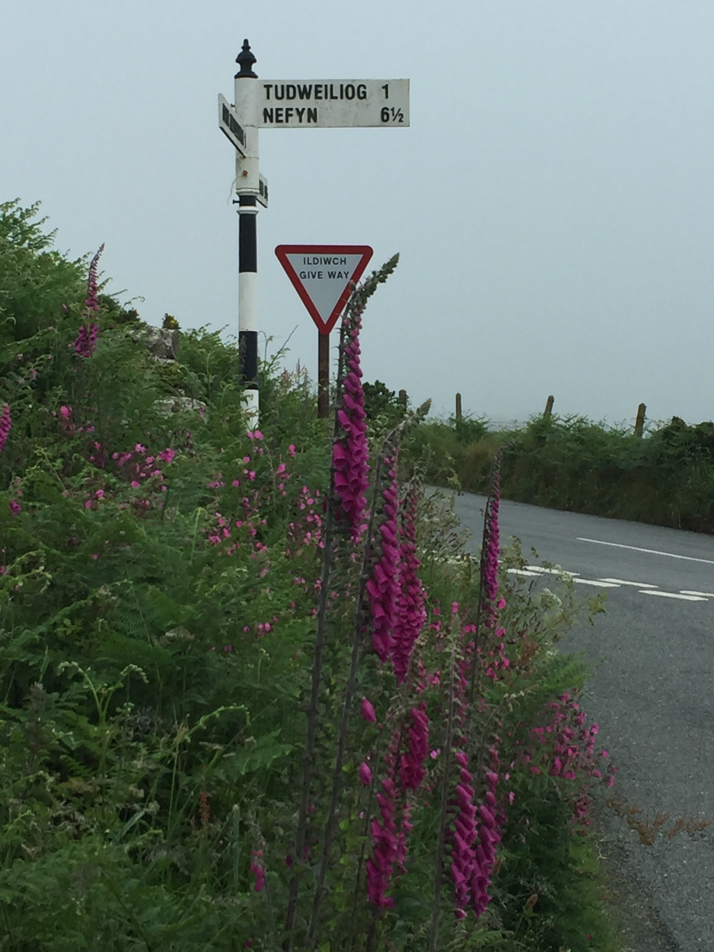 Llun o Beudy Bigin, Tudweiliog